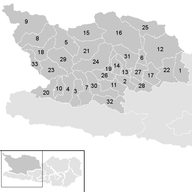 Leere Karte mit den Gemeinden im Österreichischen Bezirk Bezirk Spittal an der Drau